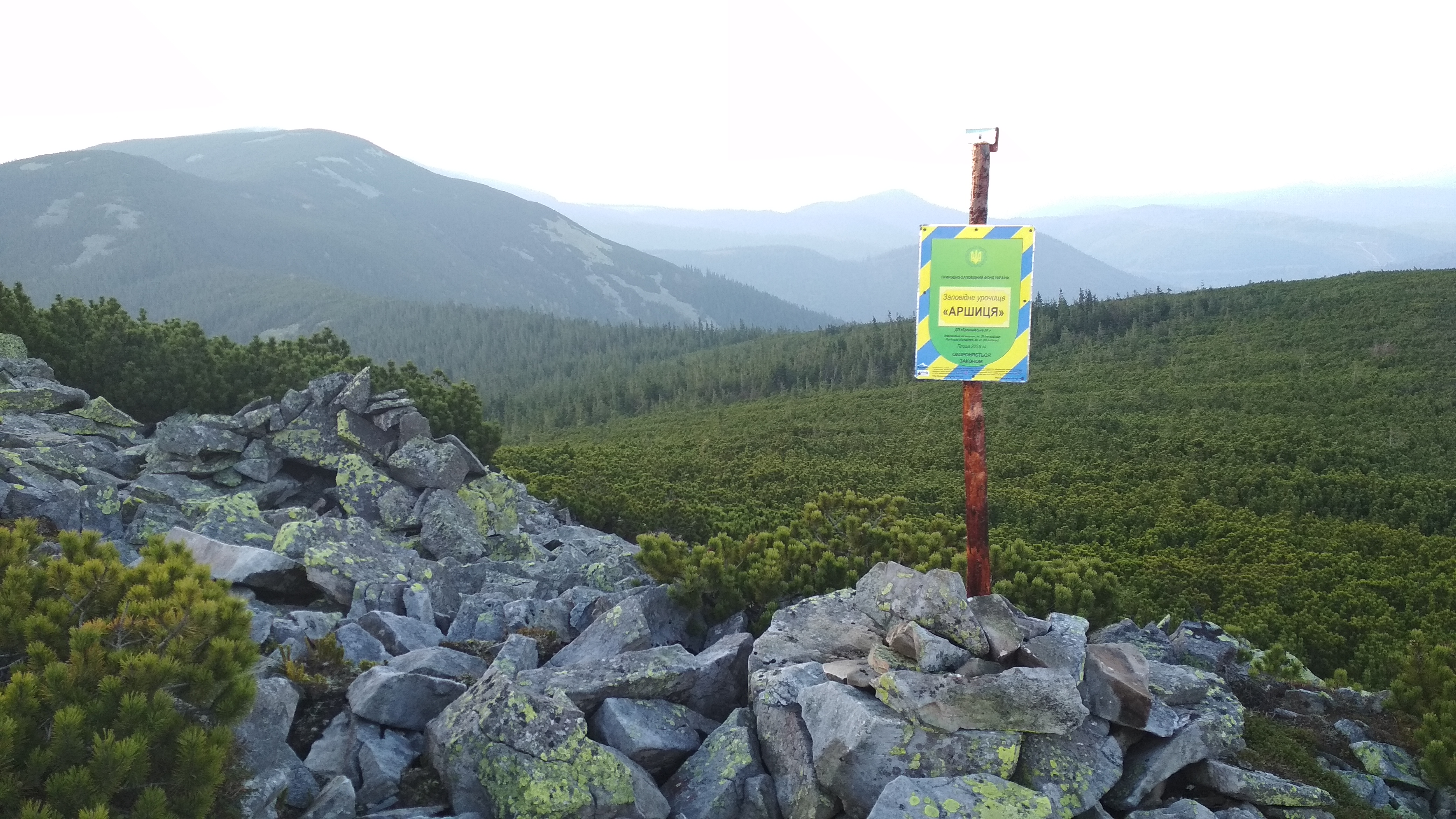 Встановлено 20.09.2018